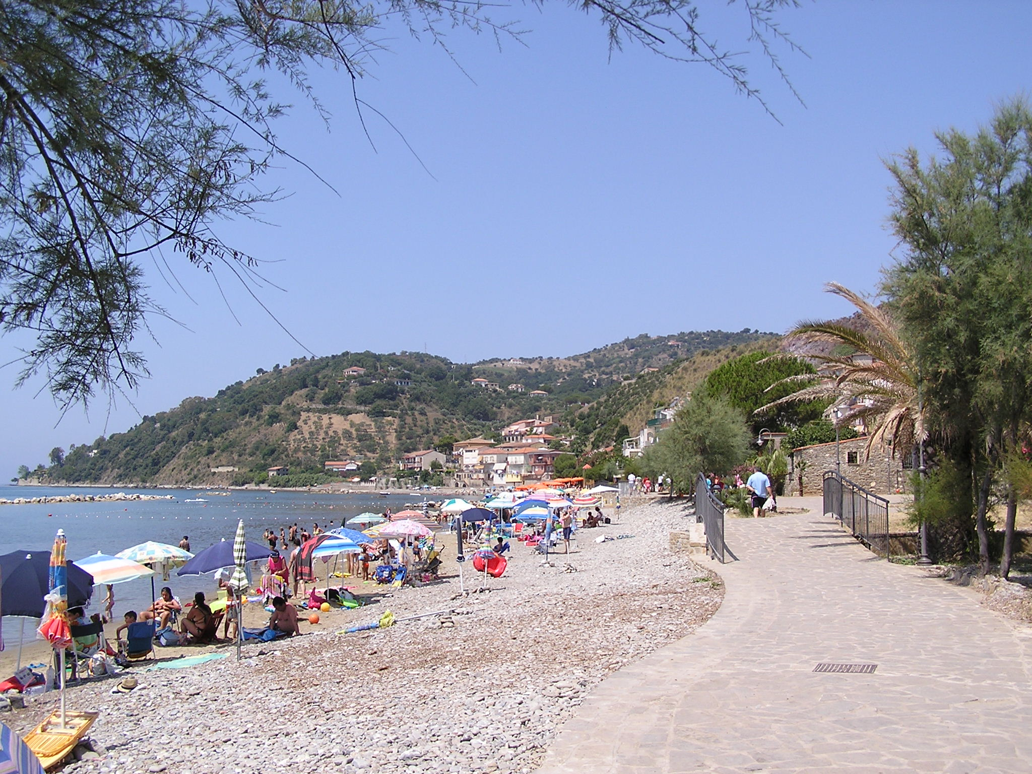 Il litorale di Pioppi in estate.